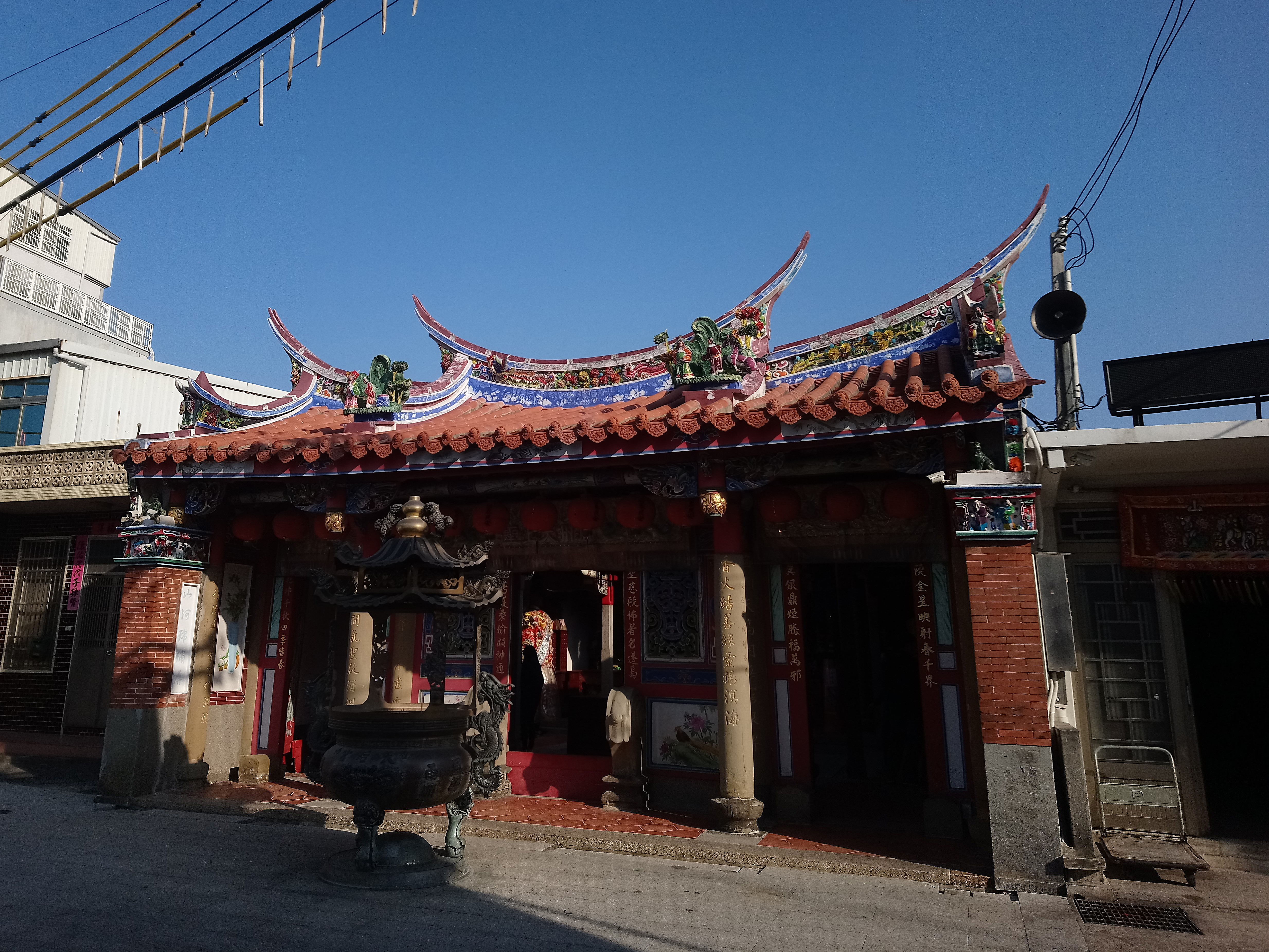 香山天后宮近景,台灣省新竹市香山區香山聯里朝山里